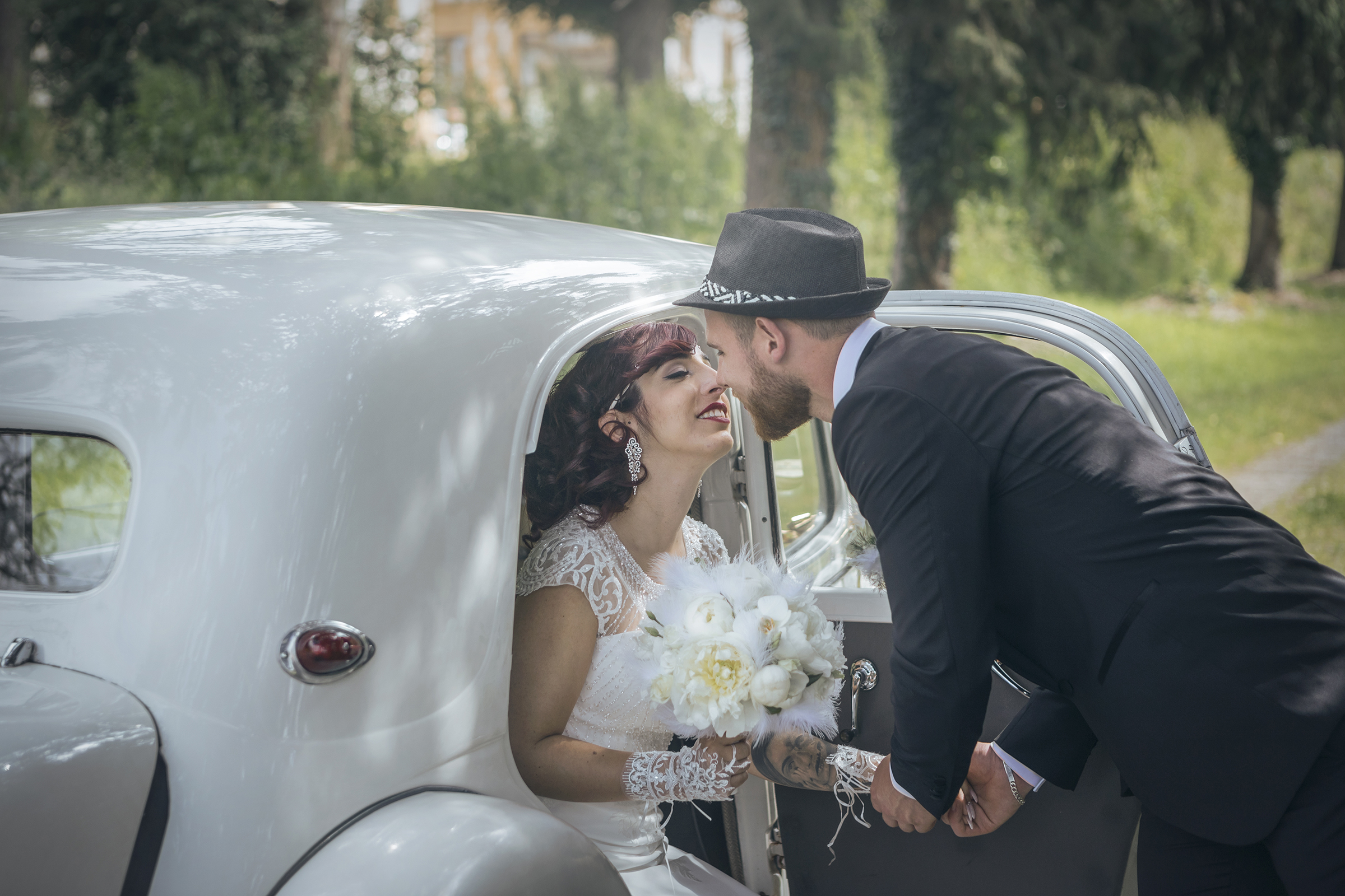 Des futurs mariés durant une séance photo de couple avant leur mariage, avec uen voiture ancienne